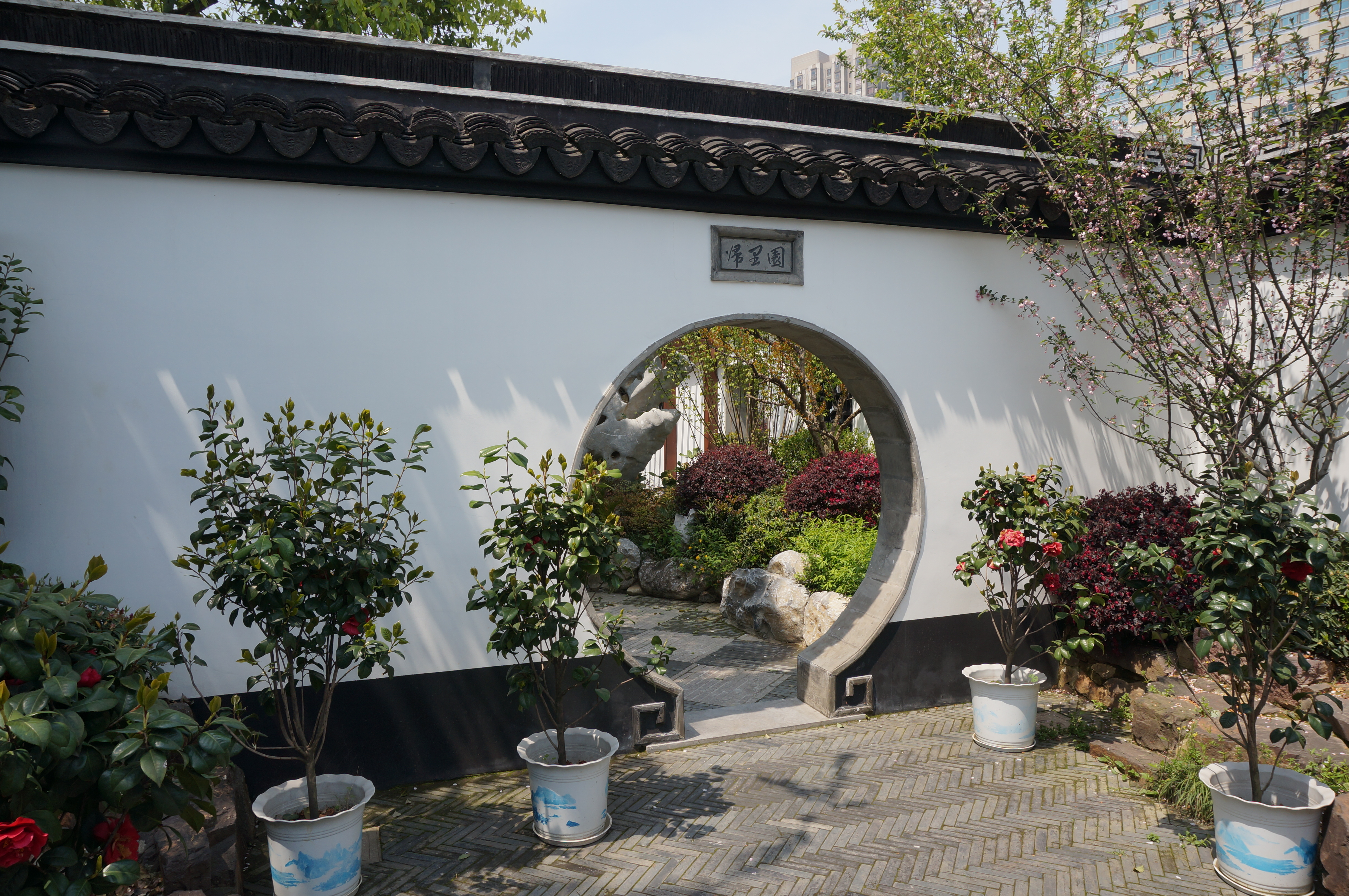 藤花旧馆，大门正对的小院左侧圆洞门。